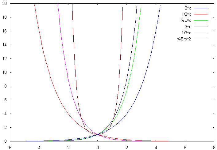 גרפים של כמה פונקציות אקספוננציאליות מהתוכנה gnuplot.